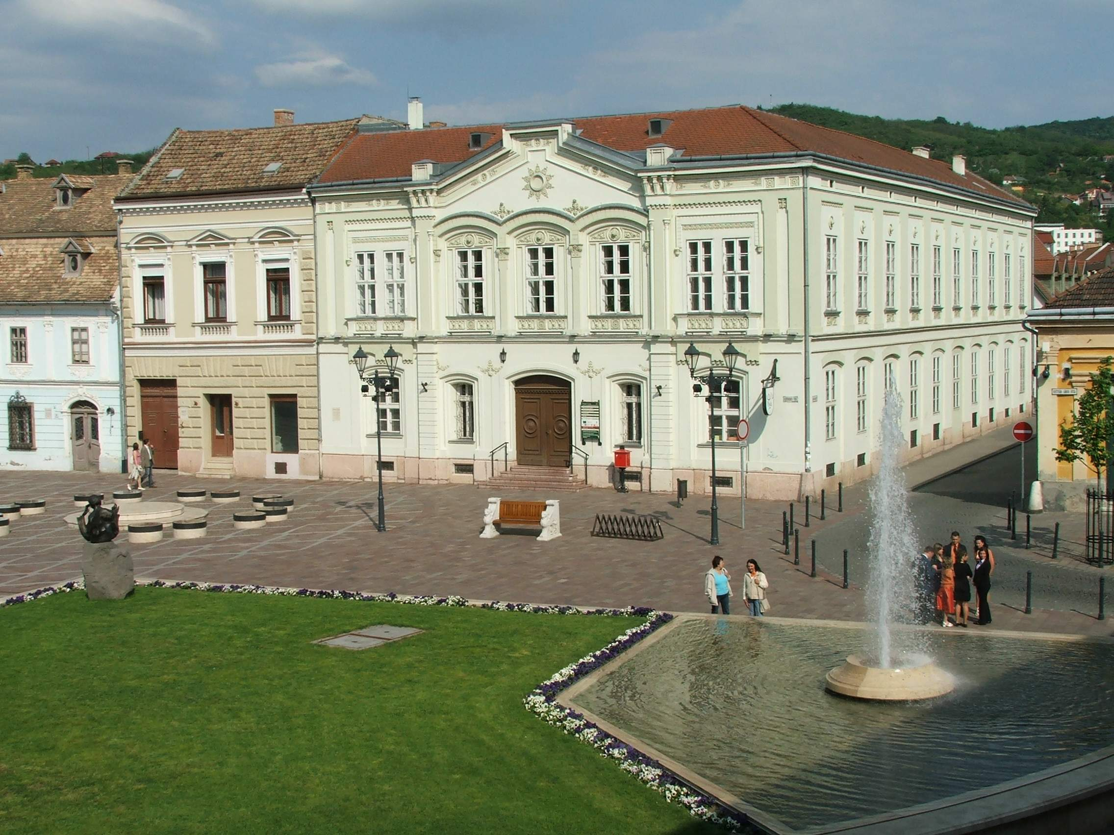 Posta, Széchenyi tér